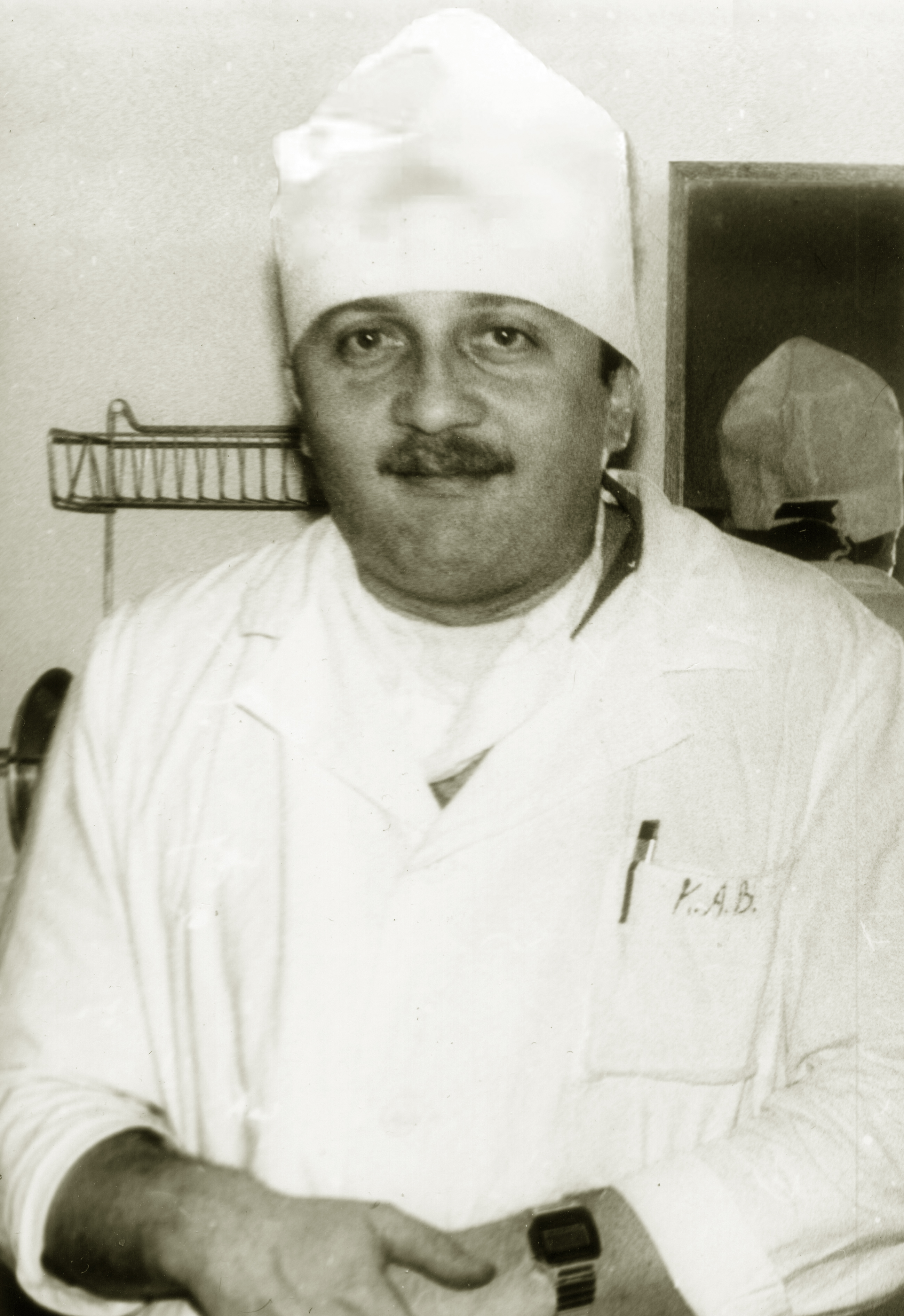 Врач детский хирург Детской городской больницы № 1 Санкт-Петербурга, вице-губернатор Санкт-Петербурга (2000 - 2003), Анатолий Владимирович Каган